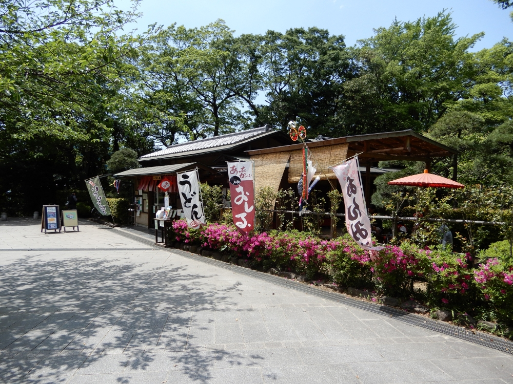 いのはな亭